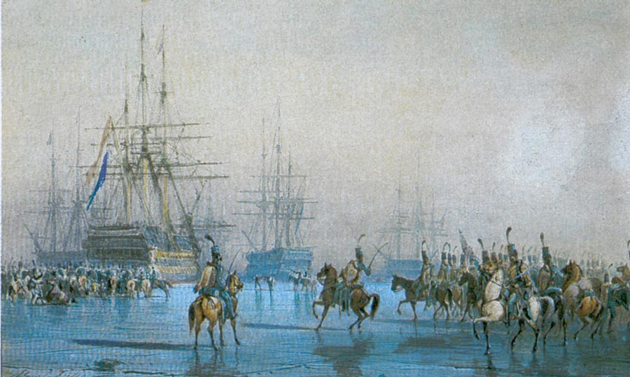 Aquarelle peinte par Léon Morel-Fatio représentant la capture de la flotte Hollandaise au Helder le 23 Janvier 1795